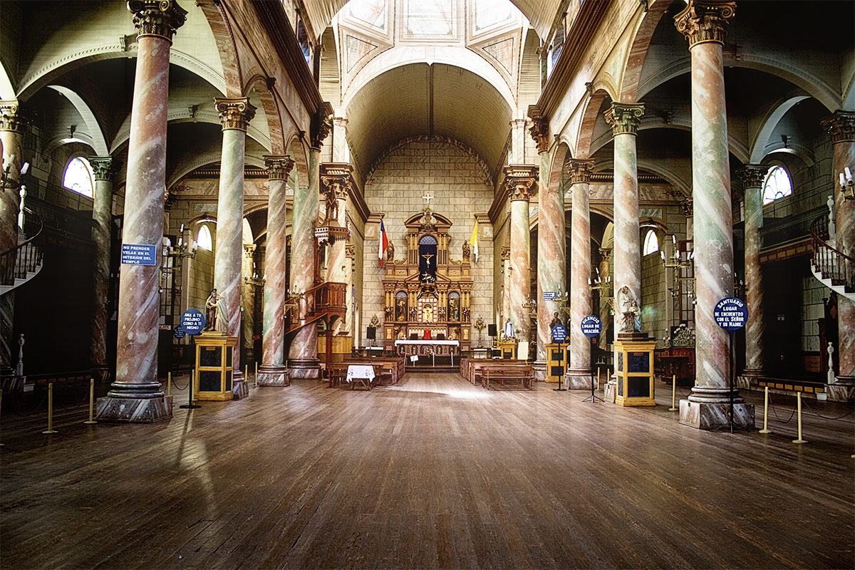 Iglesia grande de Andacollo This is a photo of a national monument in Chile: 604